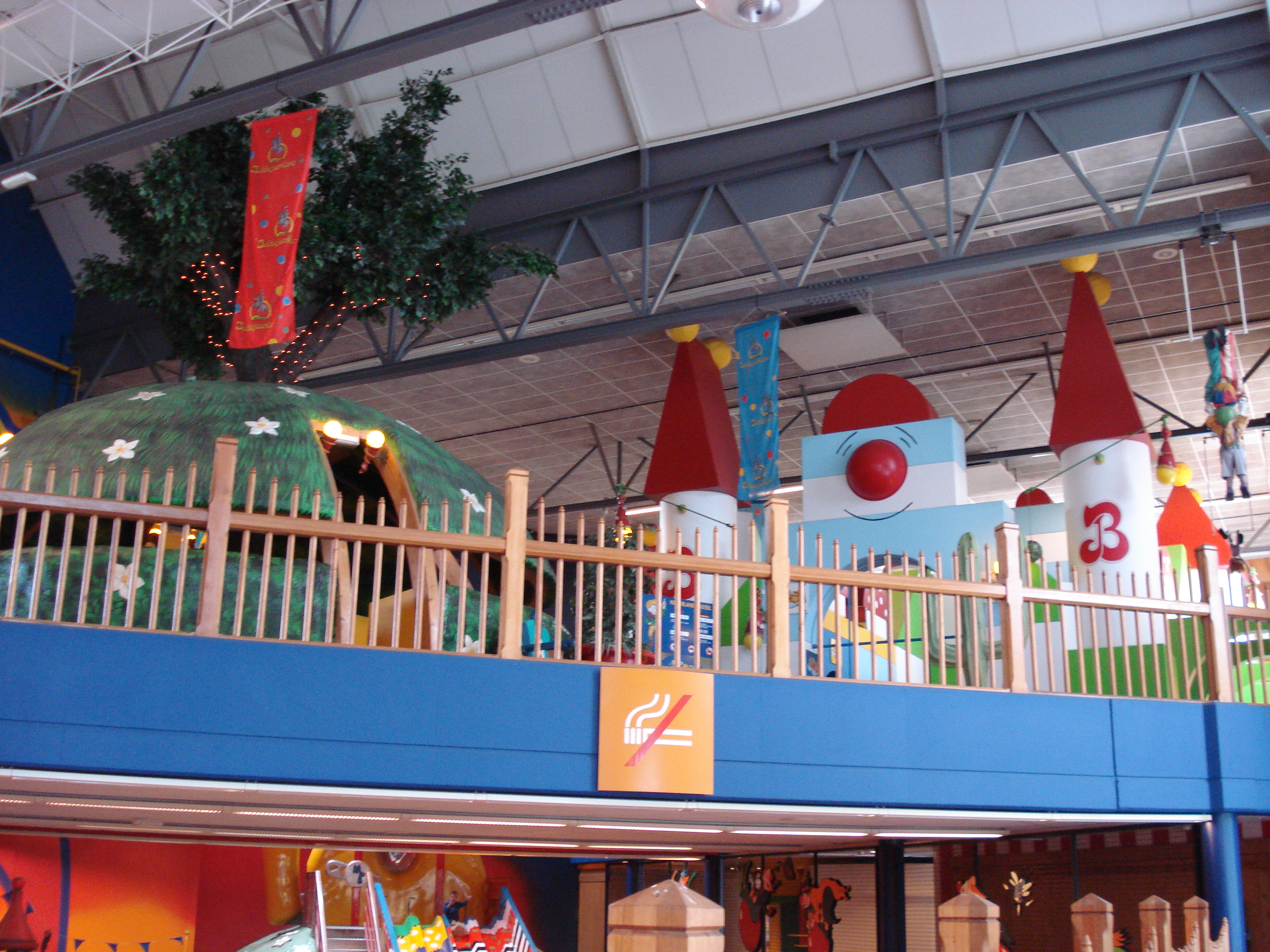 Kinderland (afgesloten gedeelte)